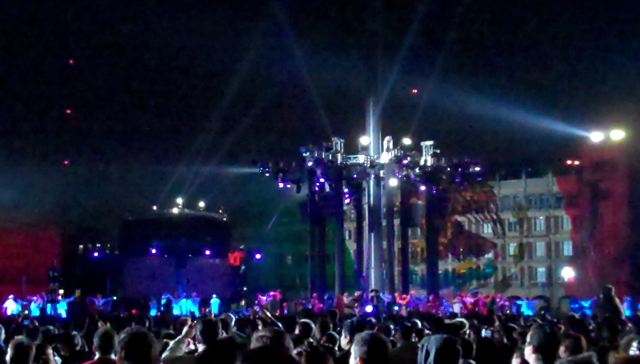 Imagen del espectáculo Yo Mexico en el Zócalo de la Ciudad de México.